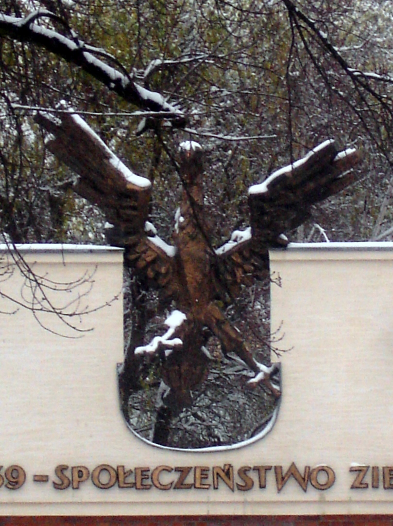 Orzeł na pomniku Żołnierzom GArnizonu Leszczyńskiego